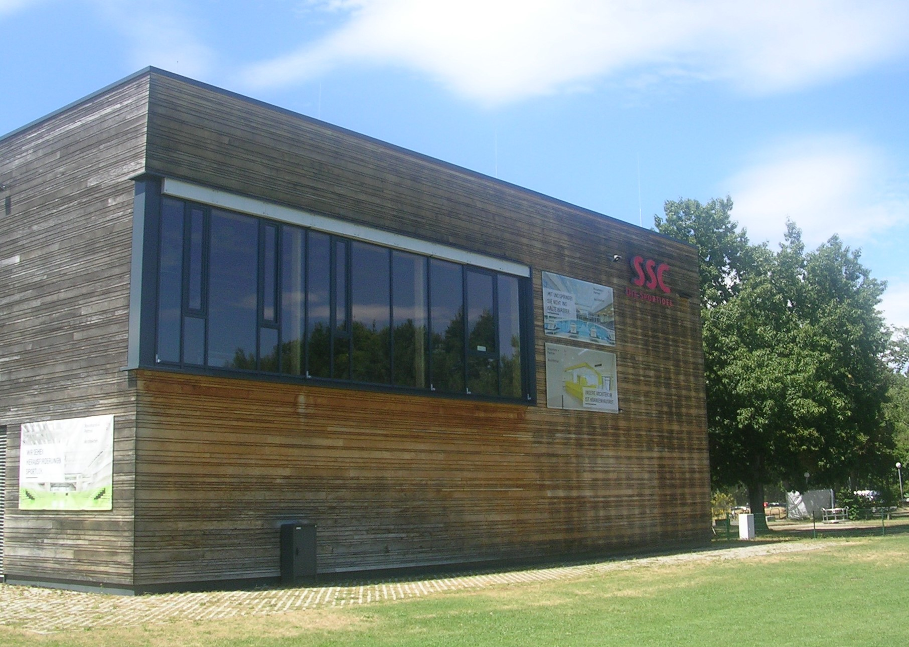 Fitness- und Gesundheitszentrum des SSC Karlsruhe vom Rasenfeld